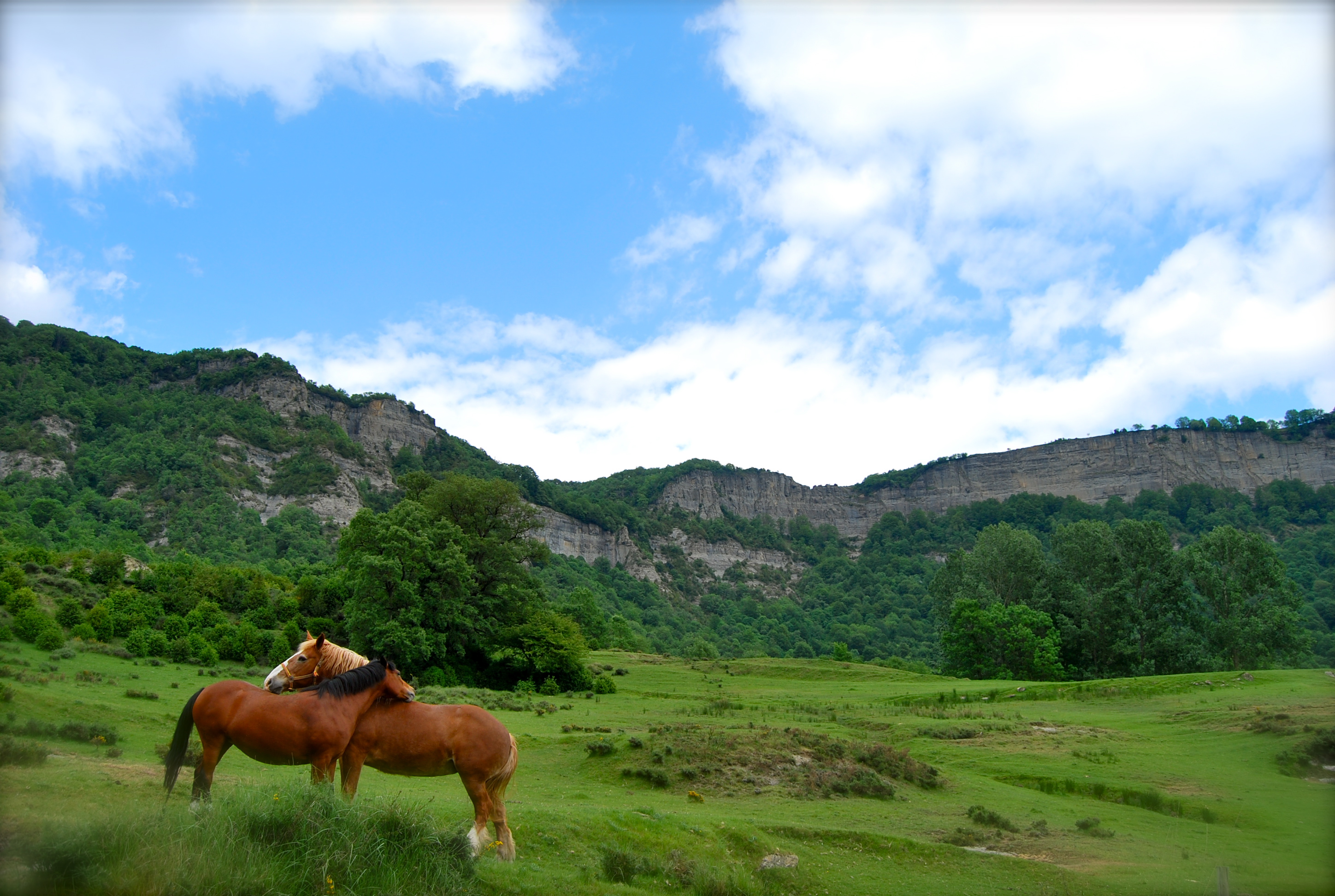 Collsacabra This is a a photo of a natural area in Catalonia, Spain, with id: ES510099